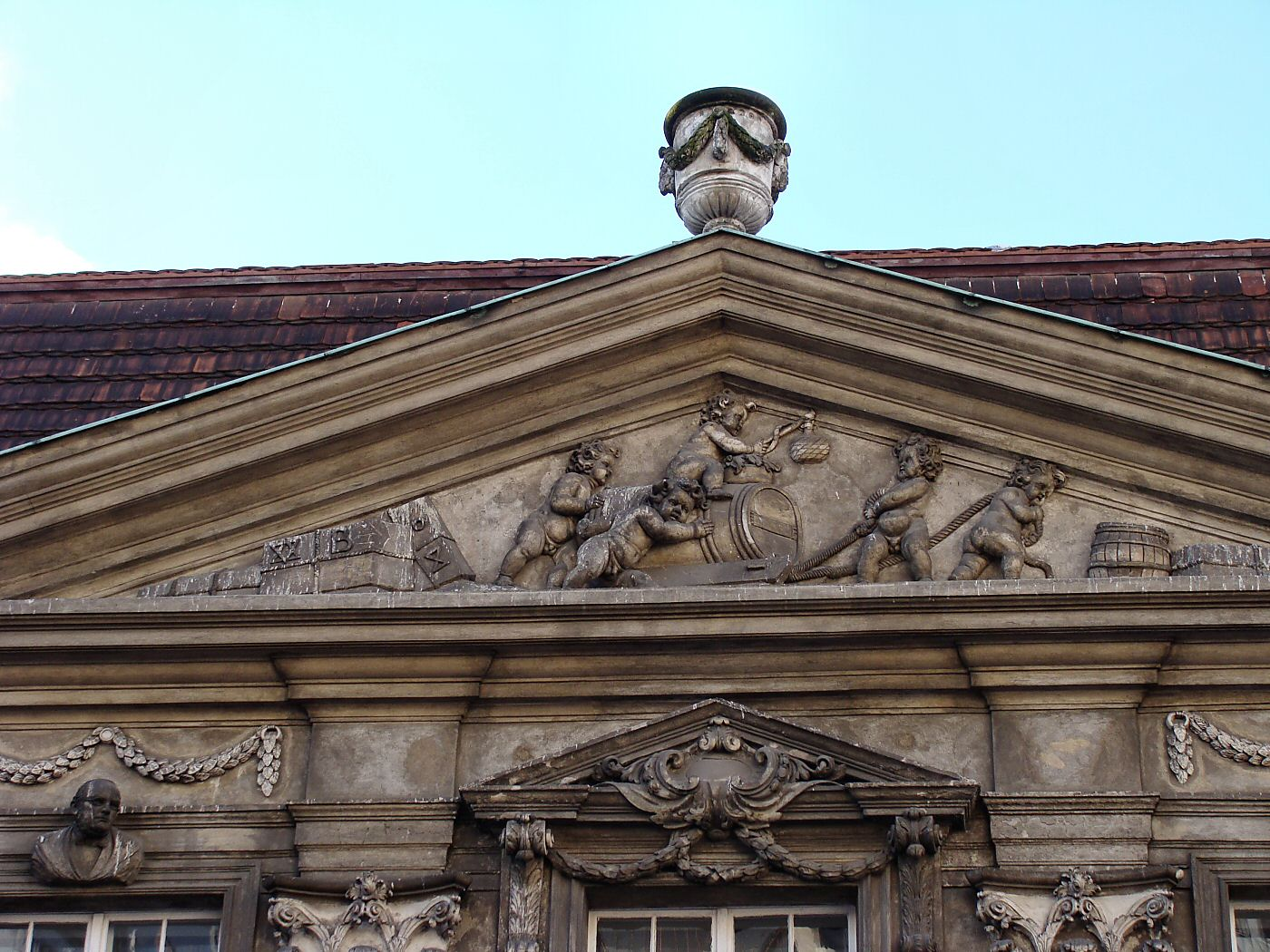 Szczecin, ul. Staromłyńska 13 - Pałac Klasycystyczny (obecnie szkoła muzyczna), XVIII (tympanon)